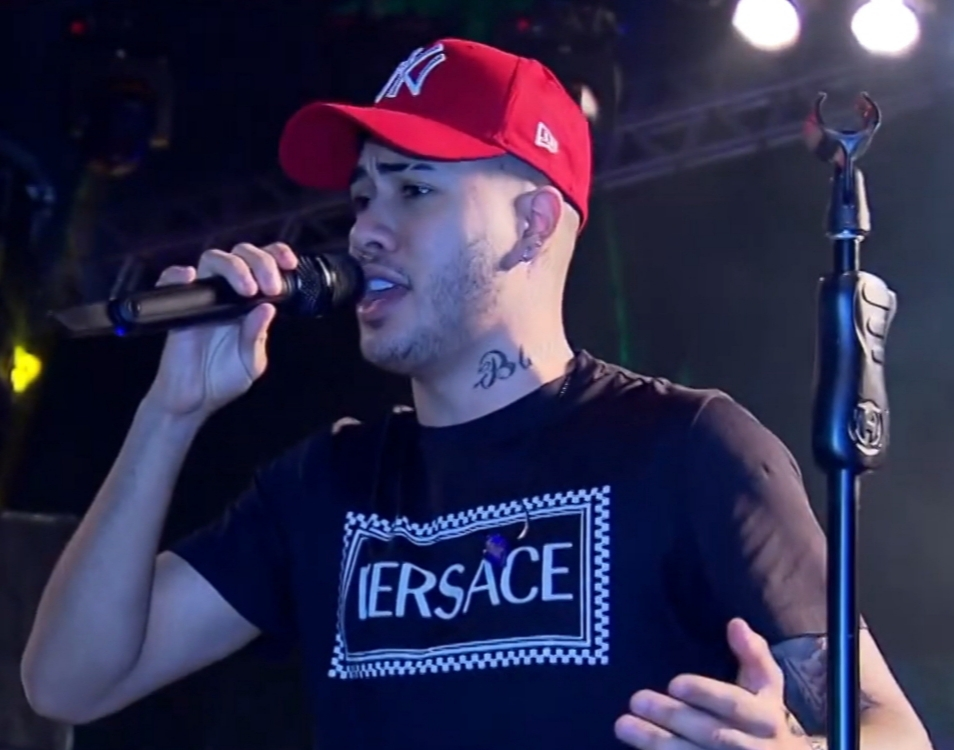 MUITO FUNK: KEVINHO AGITA PÚBLICO DE GOIÂNIA